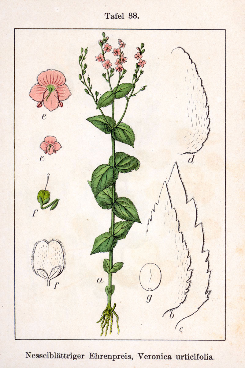 Veronica urticifolia Jacq. Original Description Nesselblättriger Ehrenpreis, Veronica urticifolia